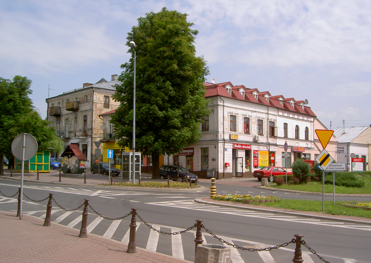 Hrubieszów, Poland • Centrum / City centre